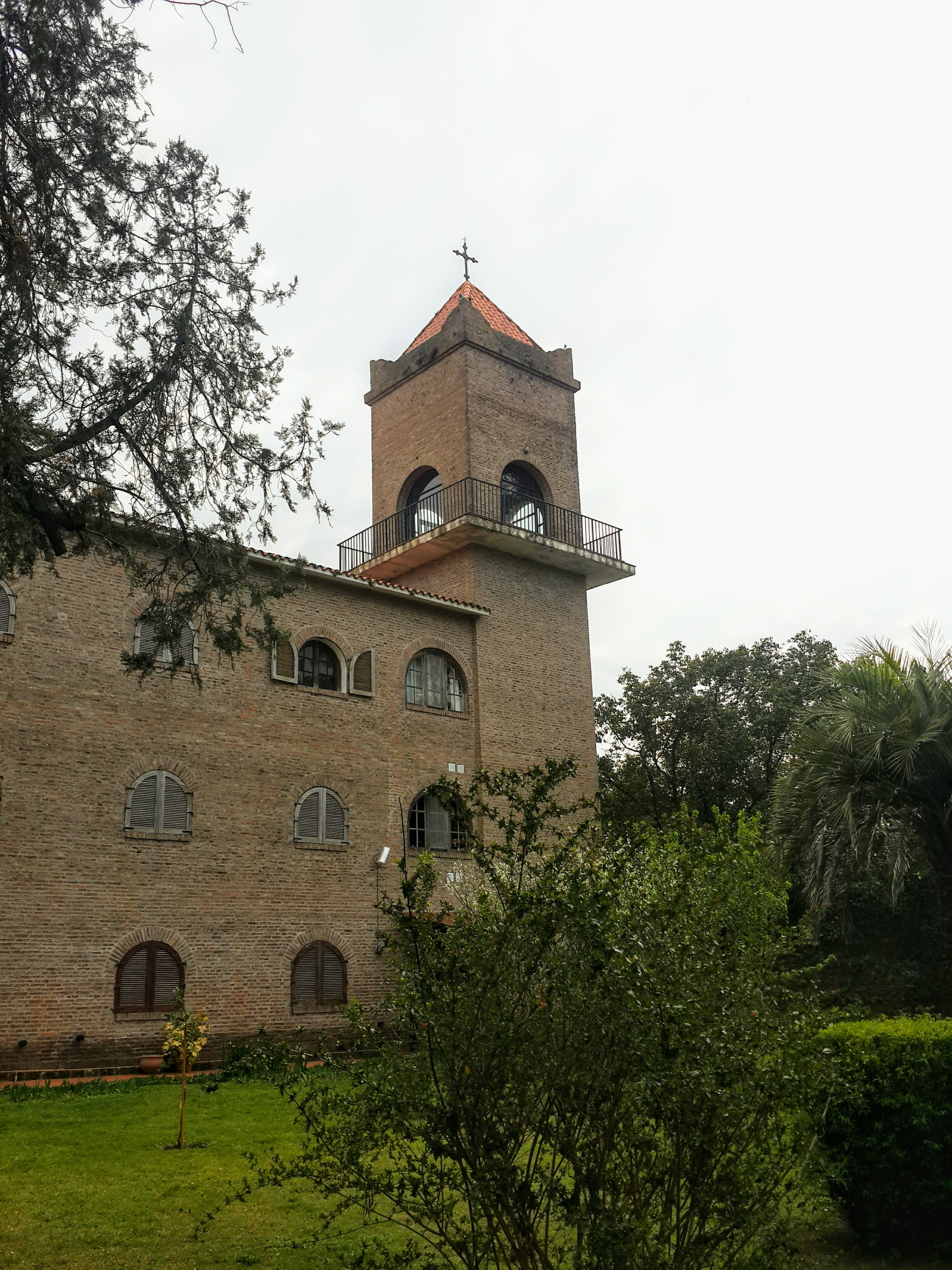 La torre de la iglesia en el convento o monasterio de las mojas misioneras de las carmelitas en el pueblo de Esther, Argentina.